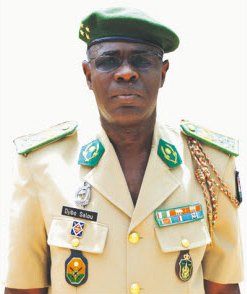 Photographie de Salou Djibo. Origine personnelle.